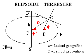 Elipsoide terrestre. Diferencia entre latitud geográfica y latitud geocéntrica.